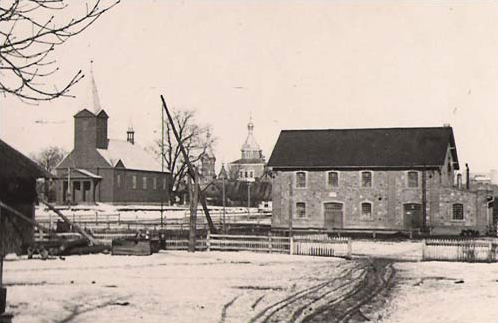 Беларуская (тарашкевіца): Вярховічы (Viarchovičy), пляц Рынак (plac Rynak). Касьцёл і царква-мураўёўка